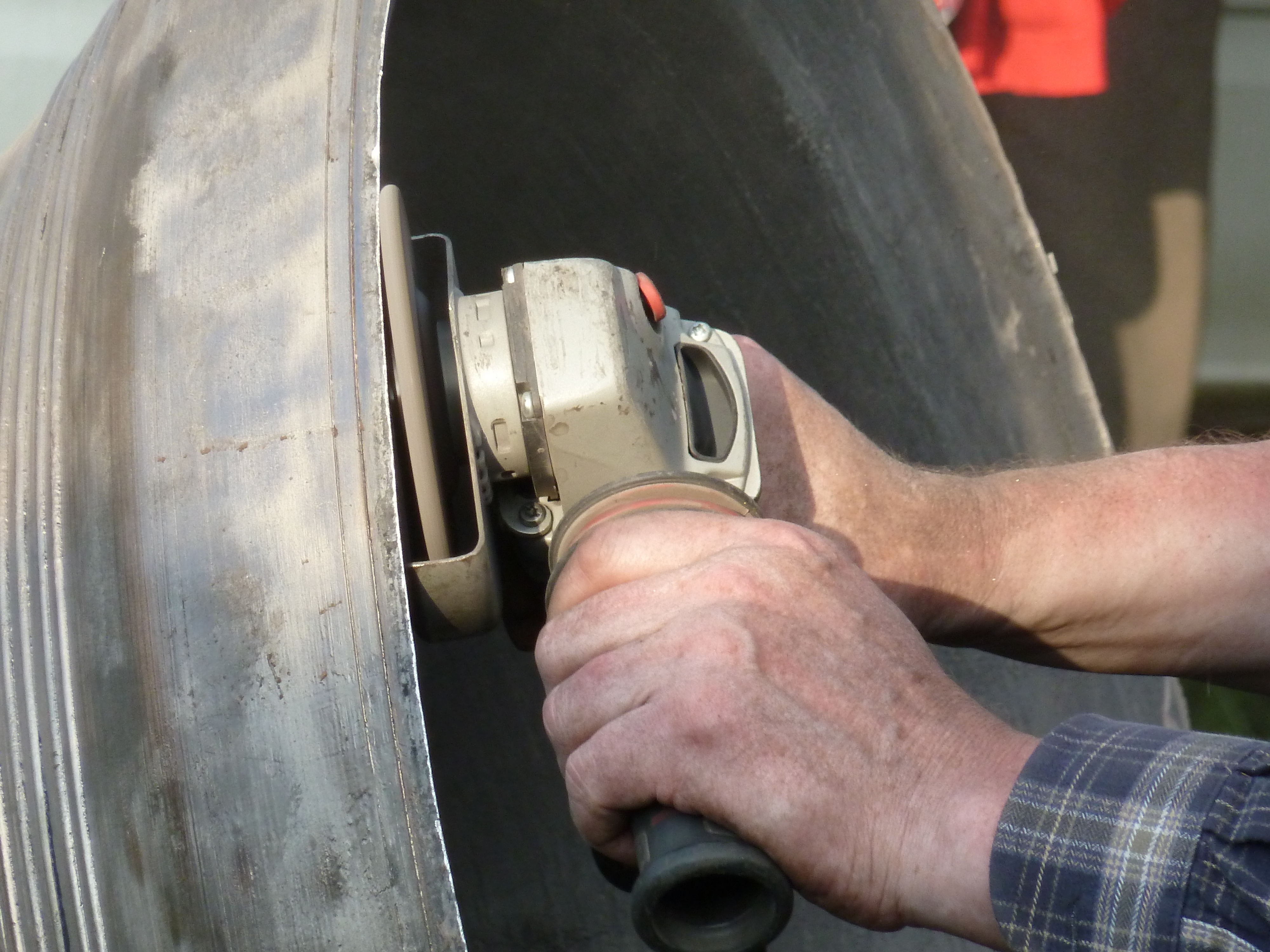 Glockenguss in Ewattingen mit Bruder Michael Reuter von der Abtei Maria Laach